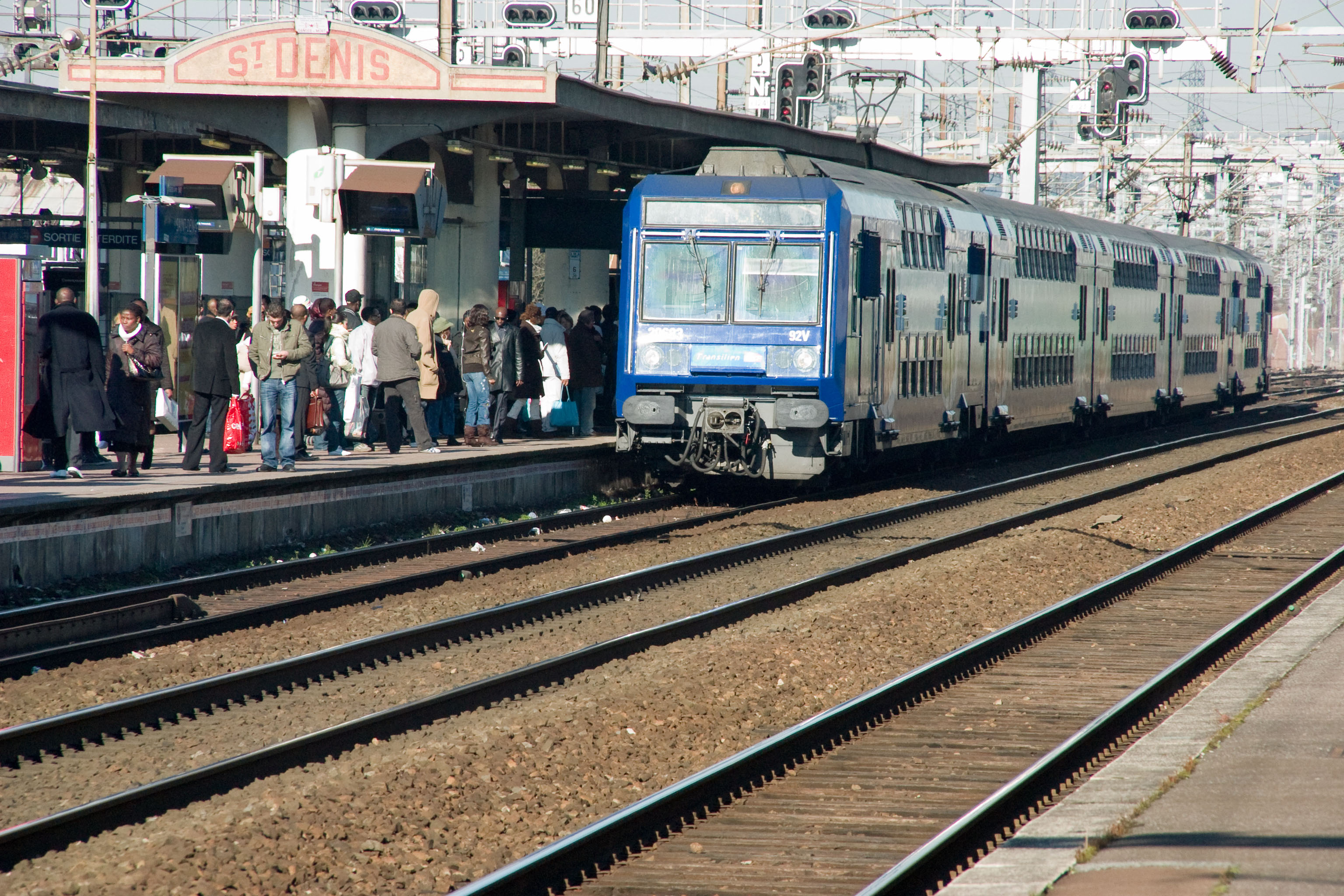 Gare de Saint-Denis, Saint-Denis, département de la Seine-Saint-Denis (France)